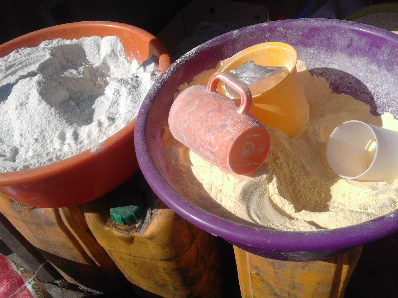 Farine de manioc et de mais